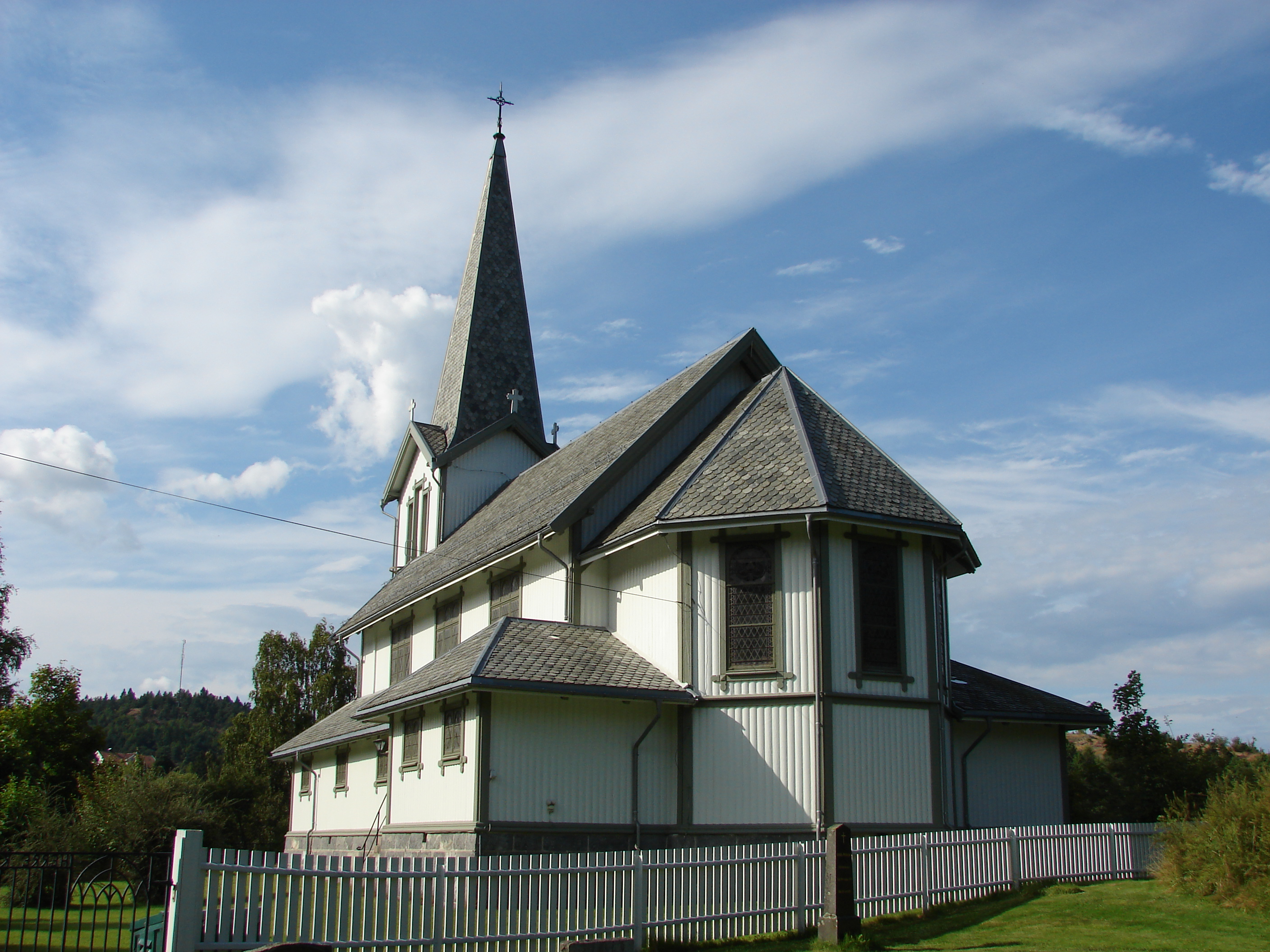 Herre Kirke, Herre, Telemark